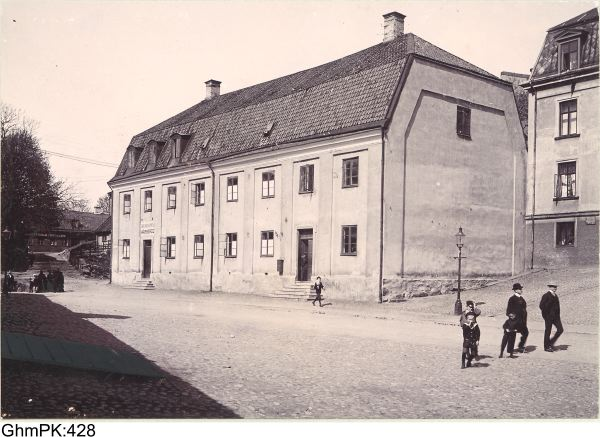 Garnisonssjukhuset i Göteborg 1902. Gamla lasarettet, om detta erinrar 1941 namnet Lasarettsgatan. Huset vänder bredsidan till Kungsgatan.